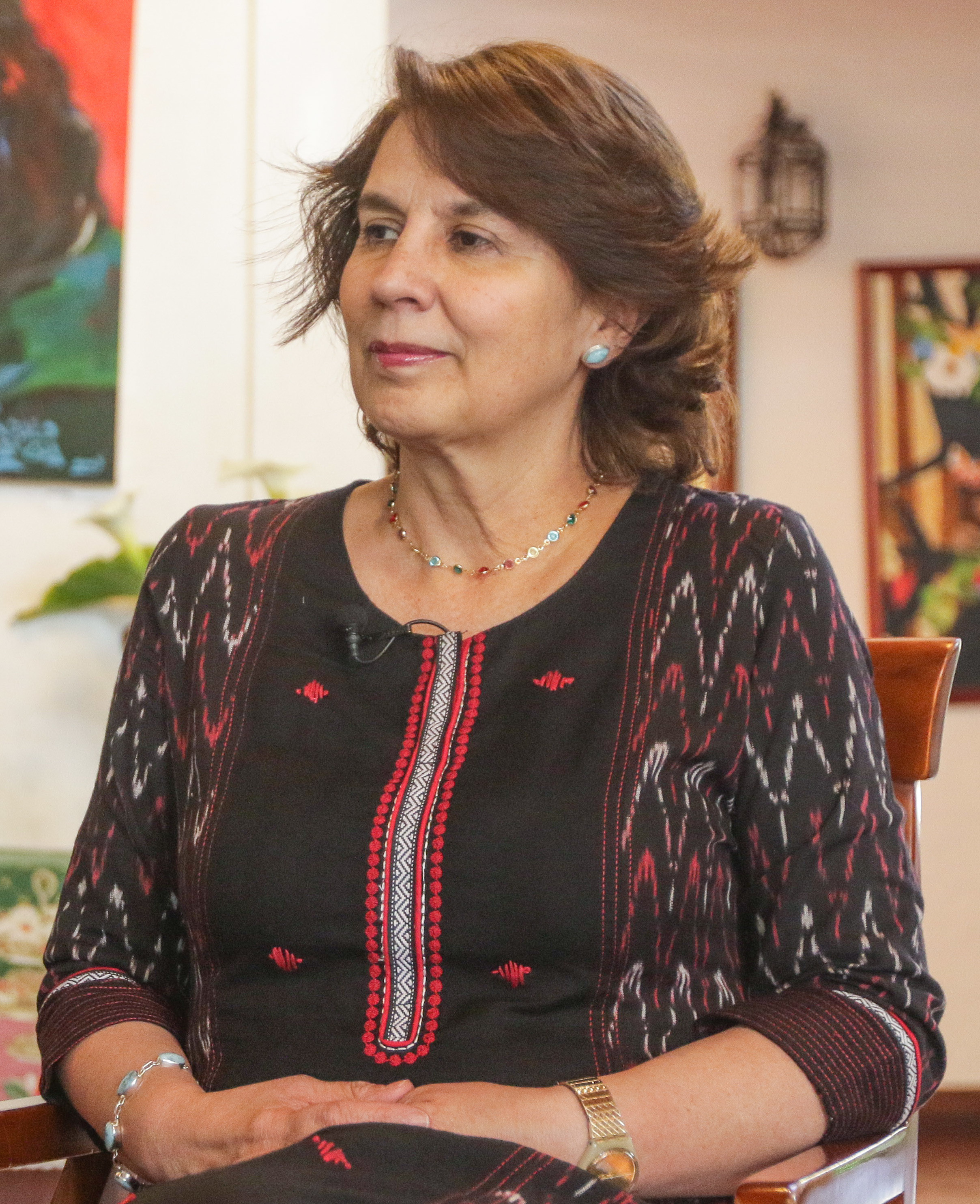 Quito 5 Ene (ANDES).- Entrevista a la ex Vicepresidenta de Ecuador, Dra. Rosalía Arteaga, discutiendo temas coyunturales del país. Fotografías: Carlos Rodríguez / ANDES. DRA. ROSALIA ARTEAGA Quito 5 Ene (ANDES).- Entrevista a la ex Vicepresidenta de Ecuador, Dra. Rosalía Arteaga, discutiendo temas coyunturales del país. Fotografías: Carlos Rodríguez / ANDES.